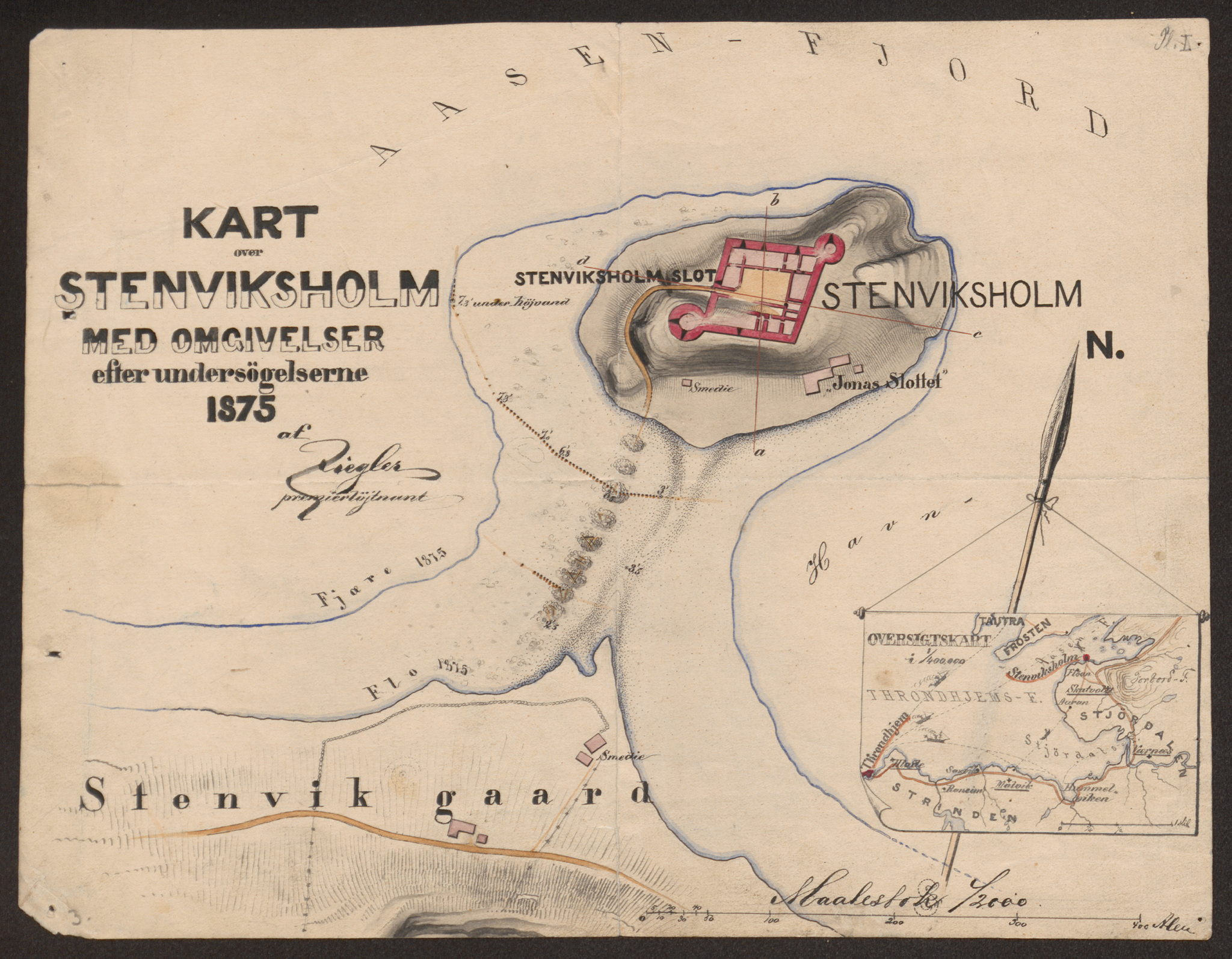 Kart over Stenviksholm med omgivelser efter undersøgelsene 1875 av oberstløytnant Reinhold Ziegler (1839-1918).